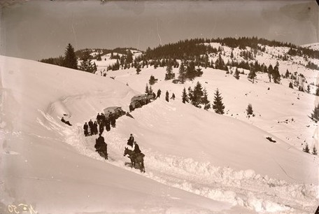 Пътници през зимен Рожен.